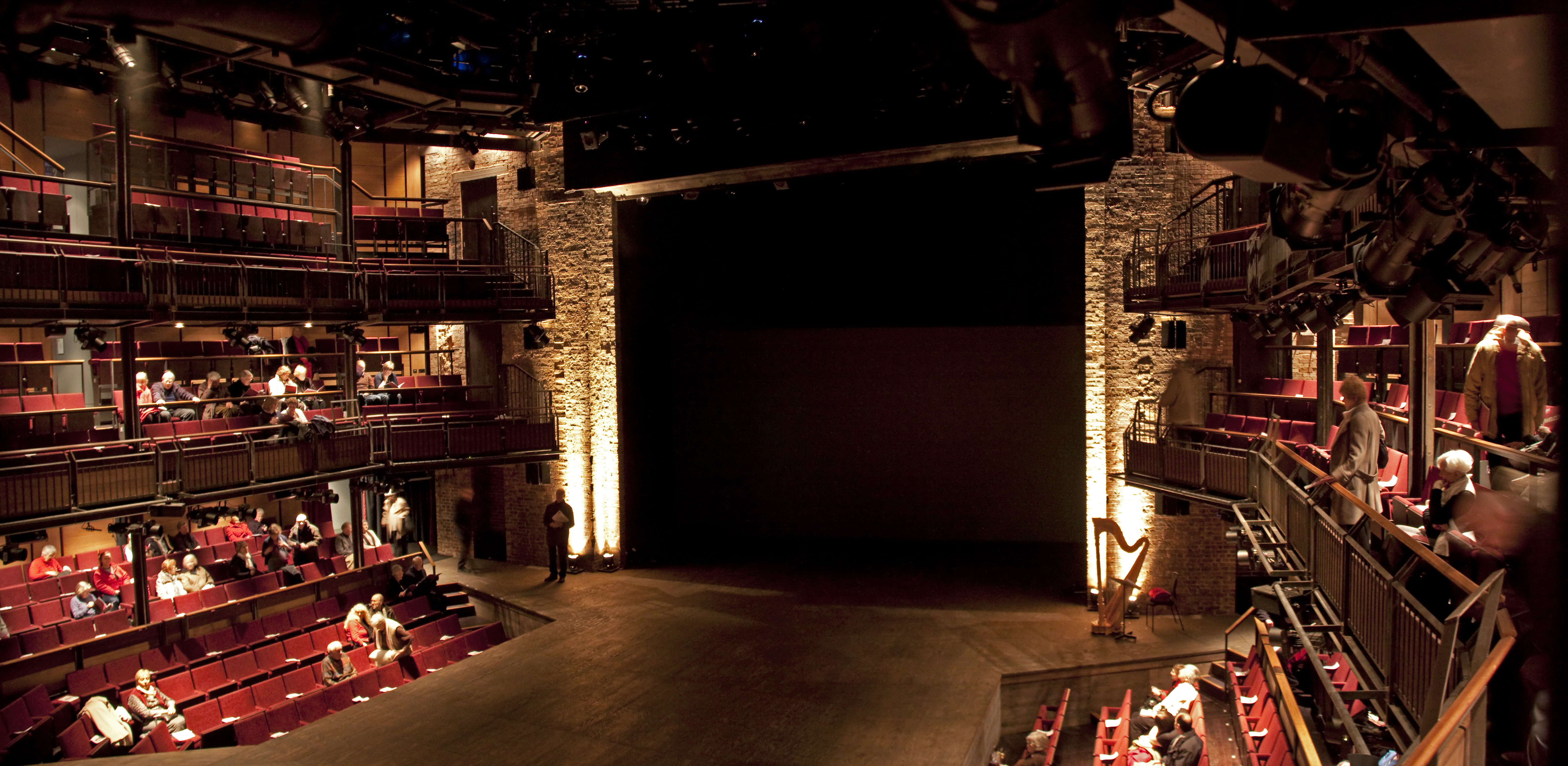 RST Stage